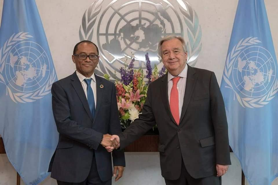 Osttimors Außenminister Dionísio Babo trifft Sierra Leones Außenministerin Nabeela Tunis